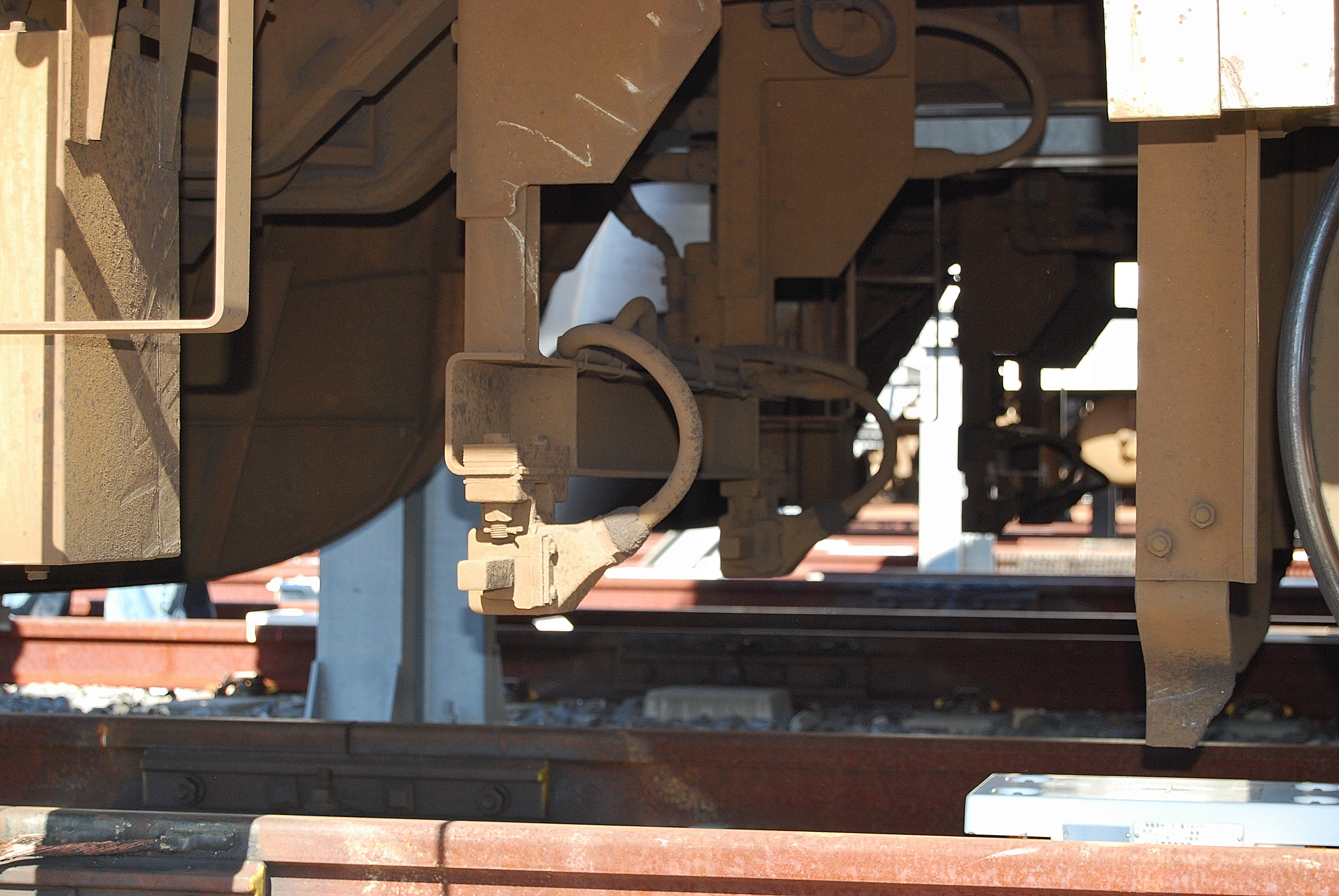 首都圏新都市鉄道TX-1000系のATC受電器（つくばエキスプレス総合基地まつりでの車両基地開放時に撮影）